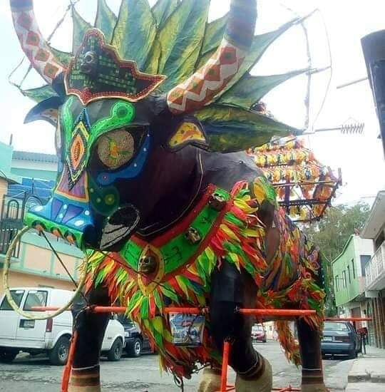 Fiesta de San Antonio 6 de Junio